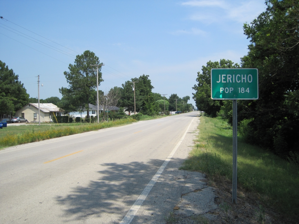 Jericho, Arkansas.